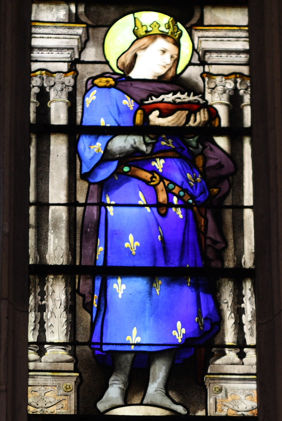 Ausschnitt eines Bleiglasfensters (19. Jahrhundert) in der katholischen Pfarrkirche Saint-Martin (Collégiale Saint-Martin) in Montmorency, Darstellung: Ludwig der Heilige